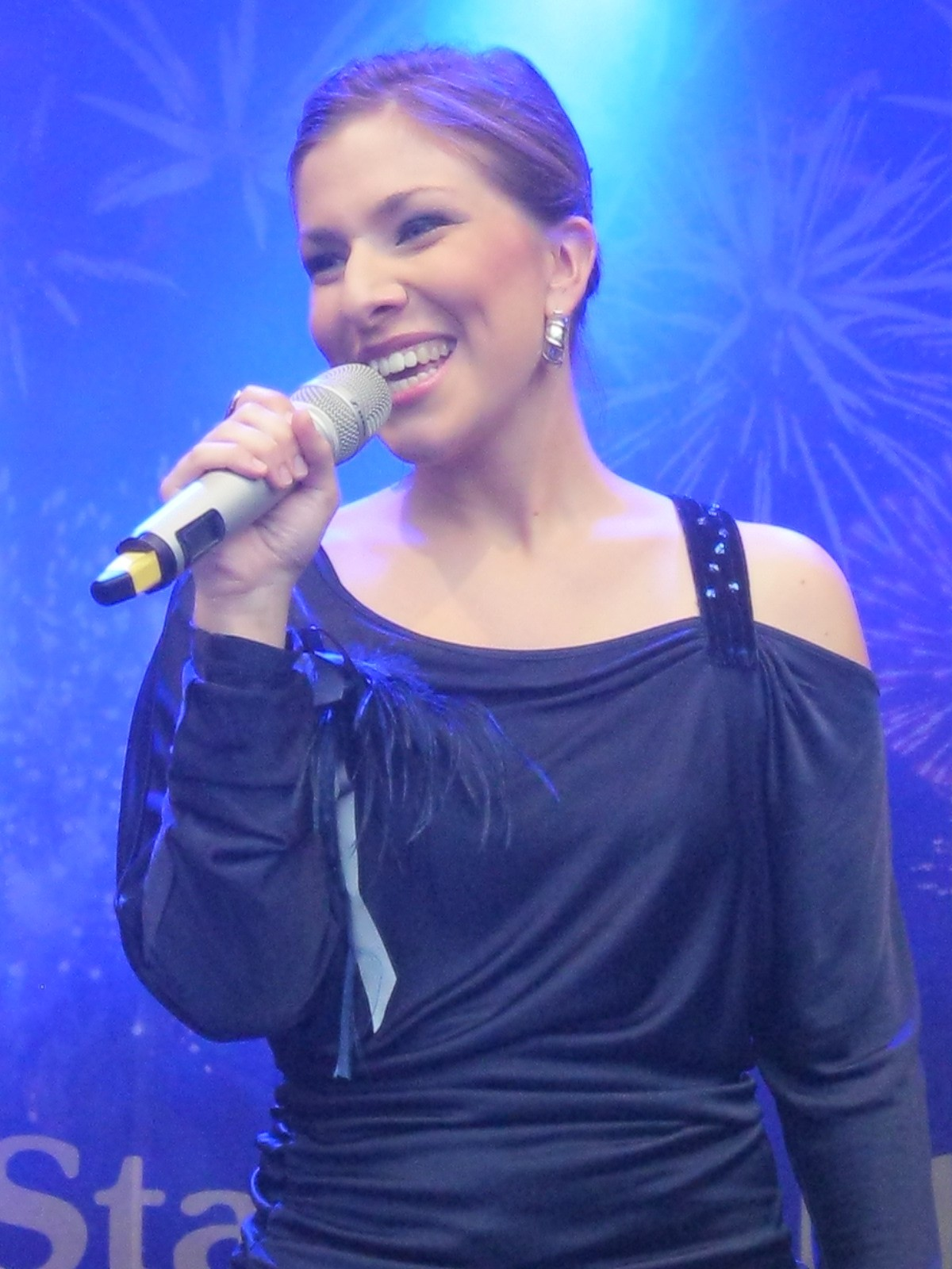 Laura Wilde beim Spreewaldfest in Lübben, 15. September 2012.